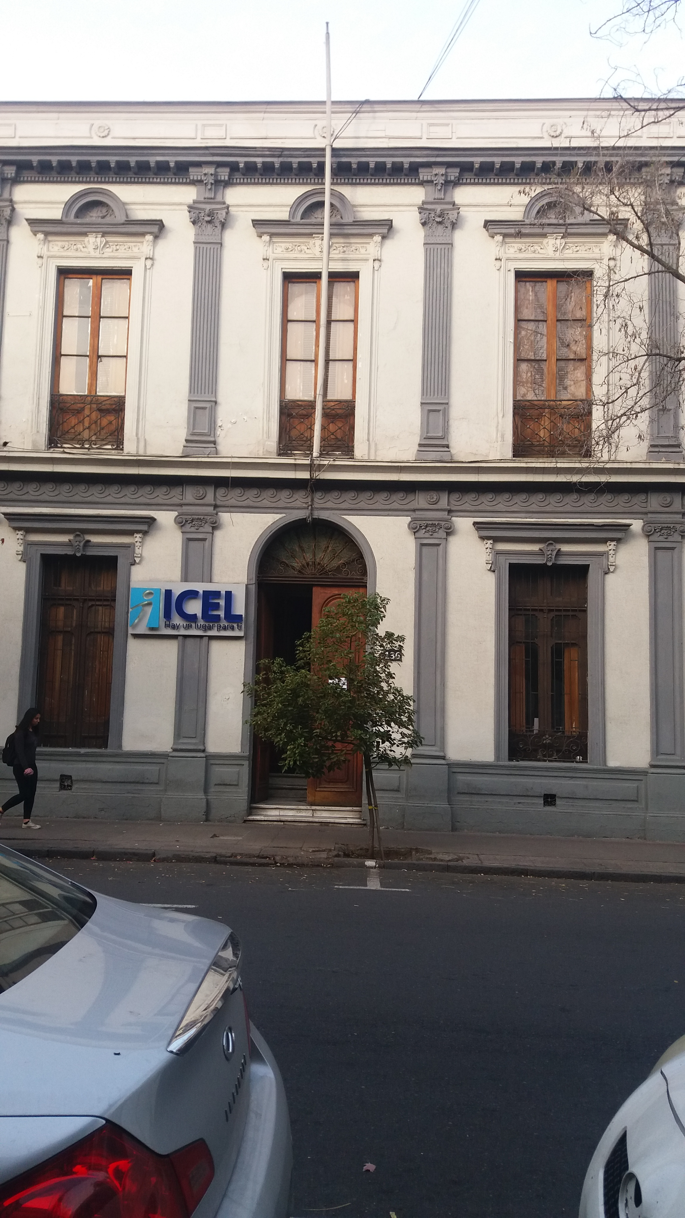 Fachada del Palacio Morandé Campino. Tomada 04/05